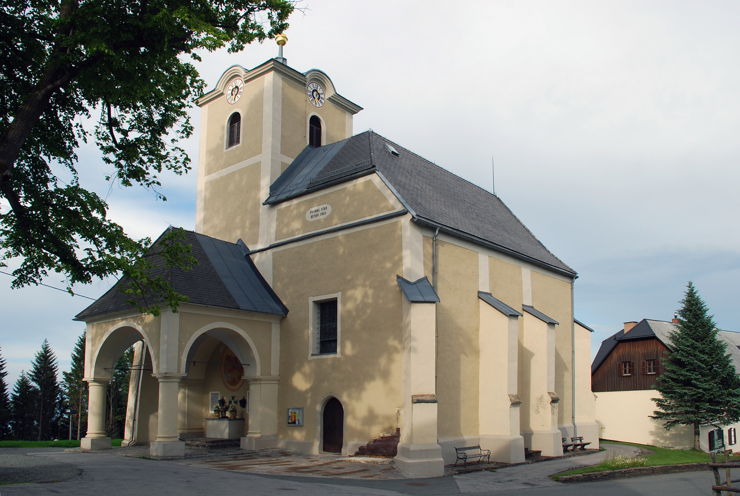 Garanas, Steiermark, Österreich: Kirche St. Anna ob Schwanberg